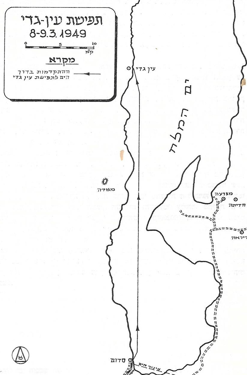 איגוף ימי בים המלח לקביעת נוכחות בעין גדי 9 מרץ 1949.